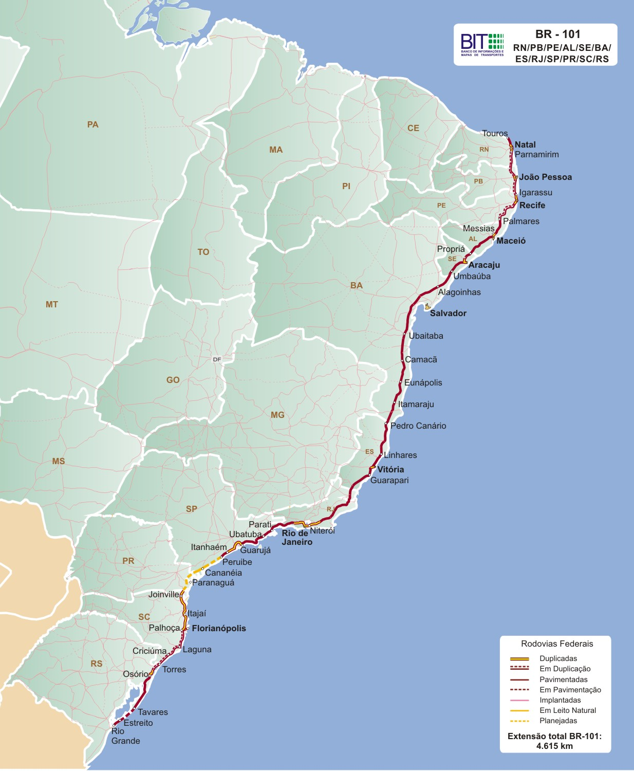 Mapa da BR-101